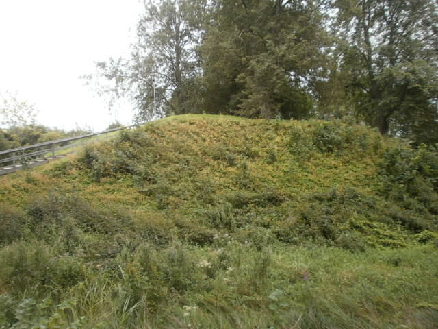 Linnuse põhjapoolne bastion. Kiriku poolt viib trepp läbi vallikraavi mäele.